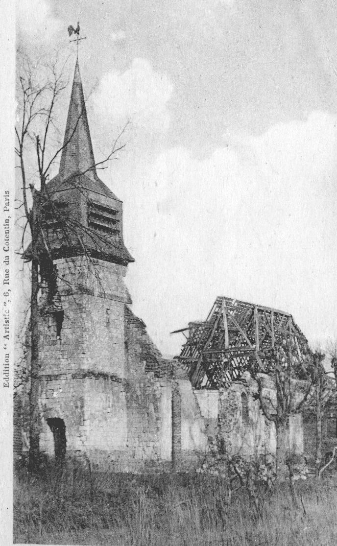 L'église de la Neuville-Sire-Bernard, 1914-1918.